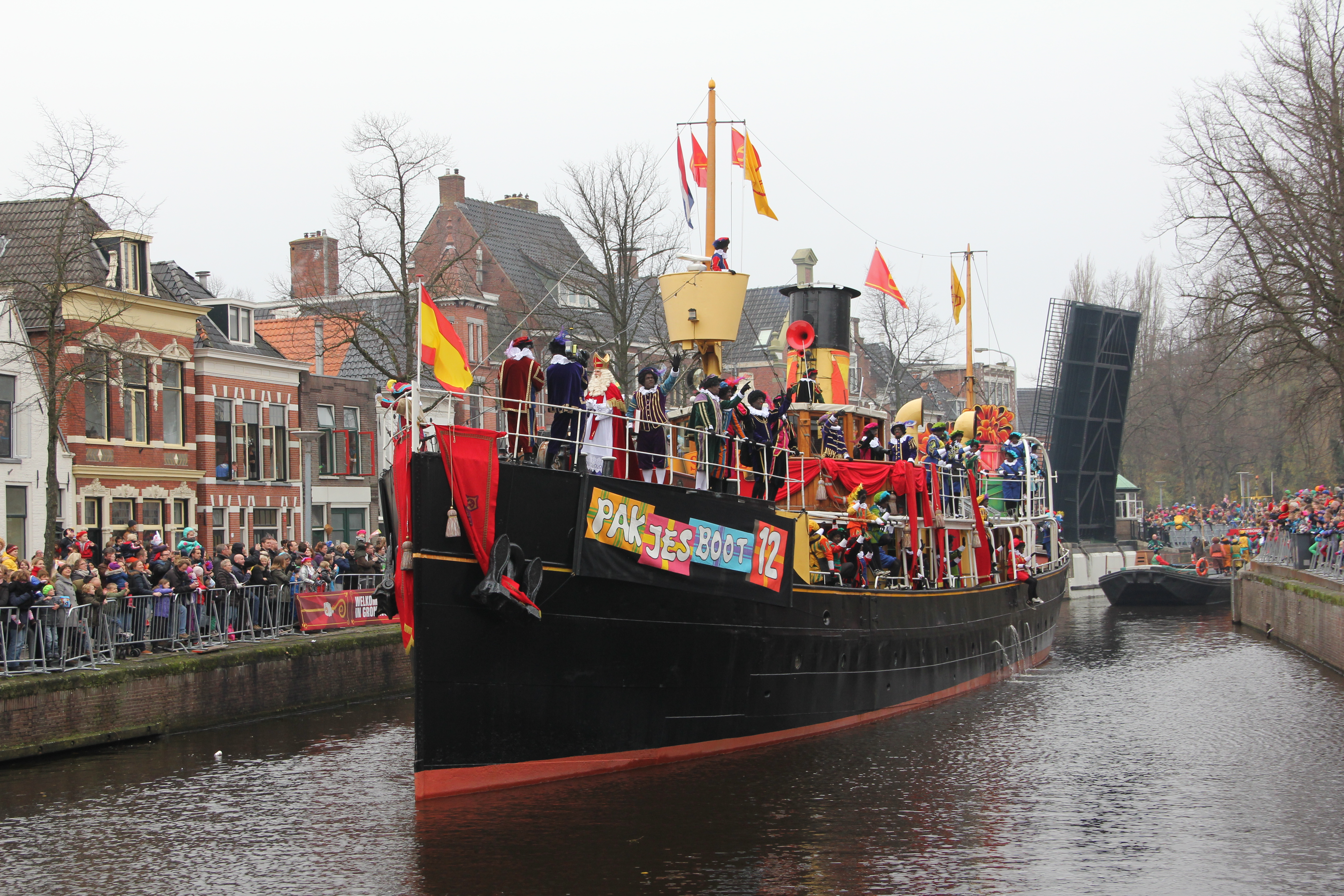 Sinterklaas en vele van zijn pieten arriveren in Groningen in Pakjesboot 12.